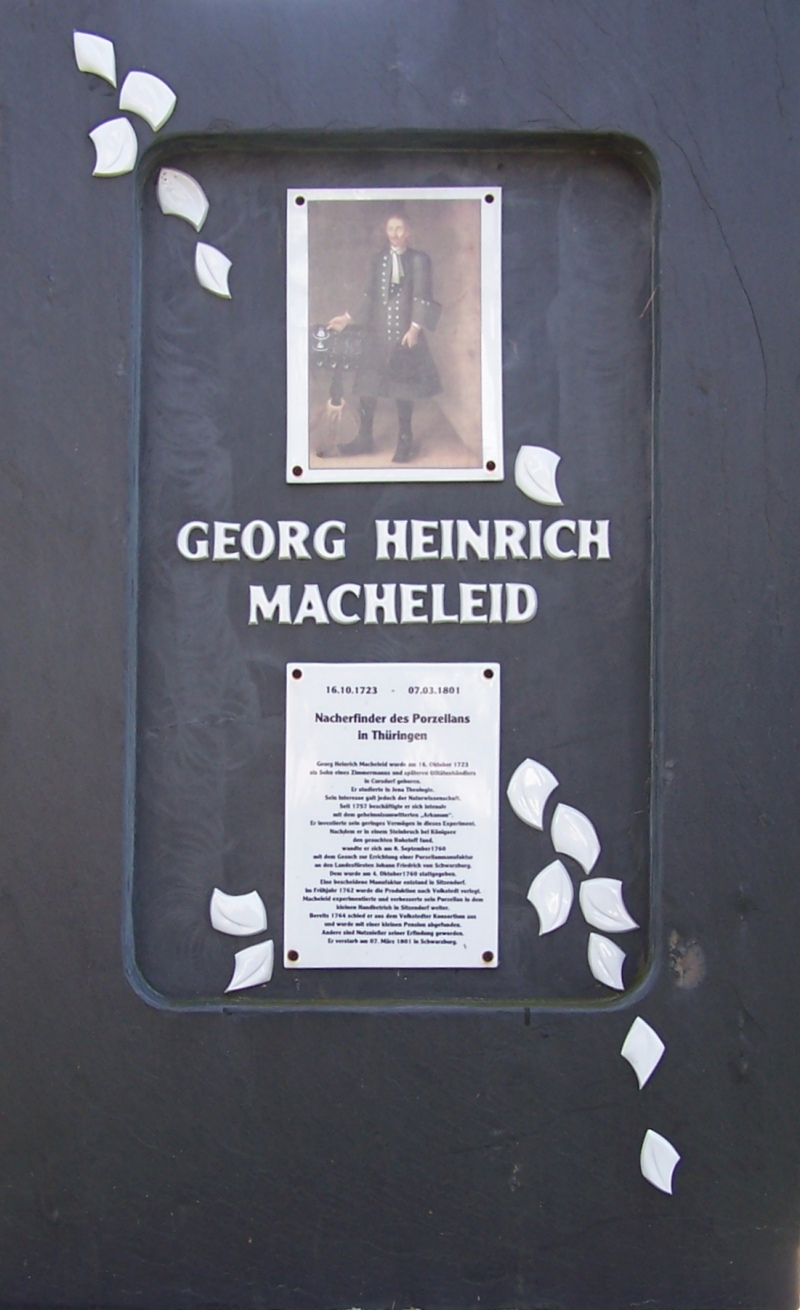 Gedenkstätte Georg Heinrich Macheleid in Cursdorf